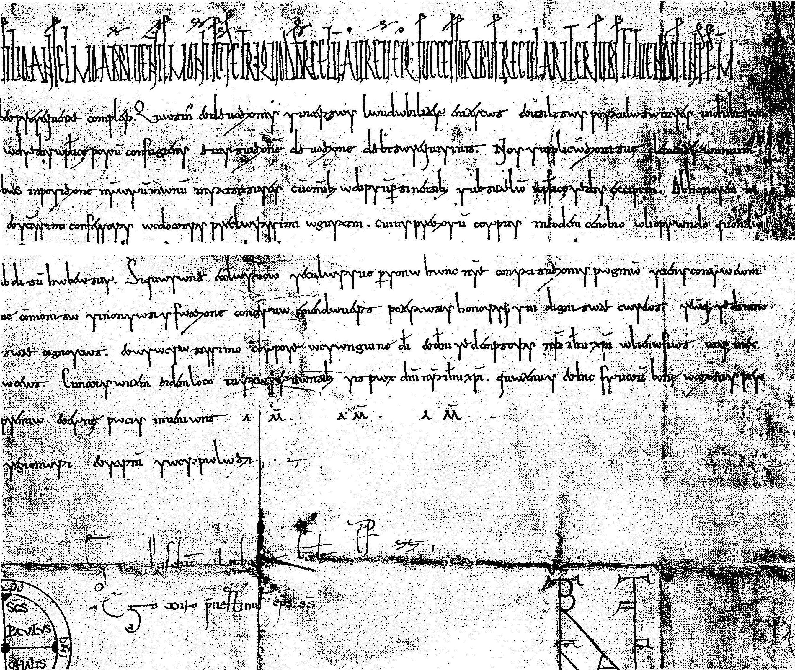 Fragment privilegia papeže Paschala II. z počátku 12. století